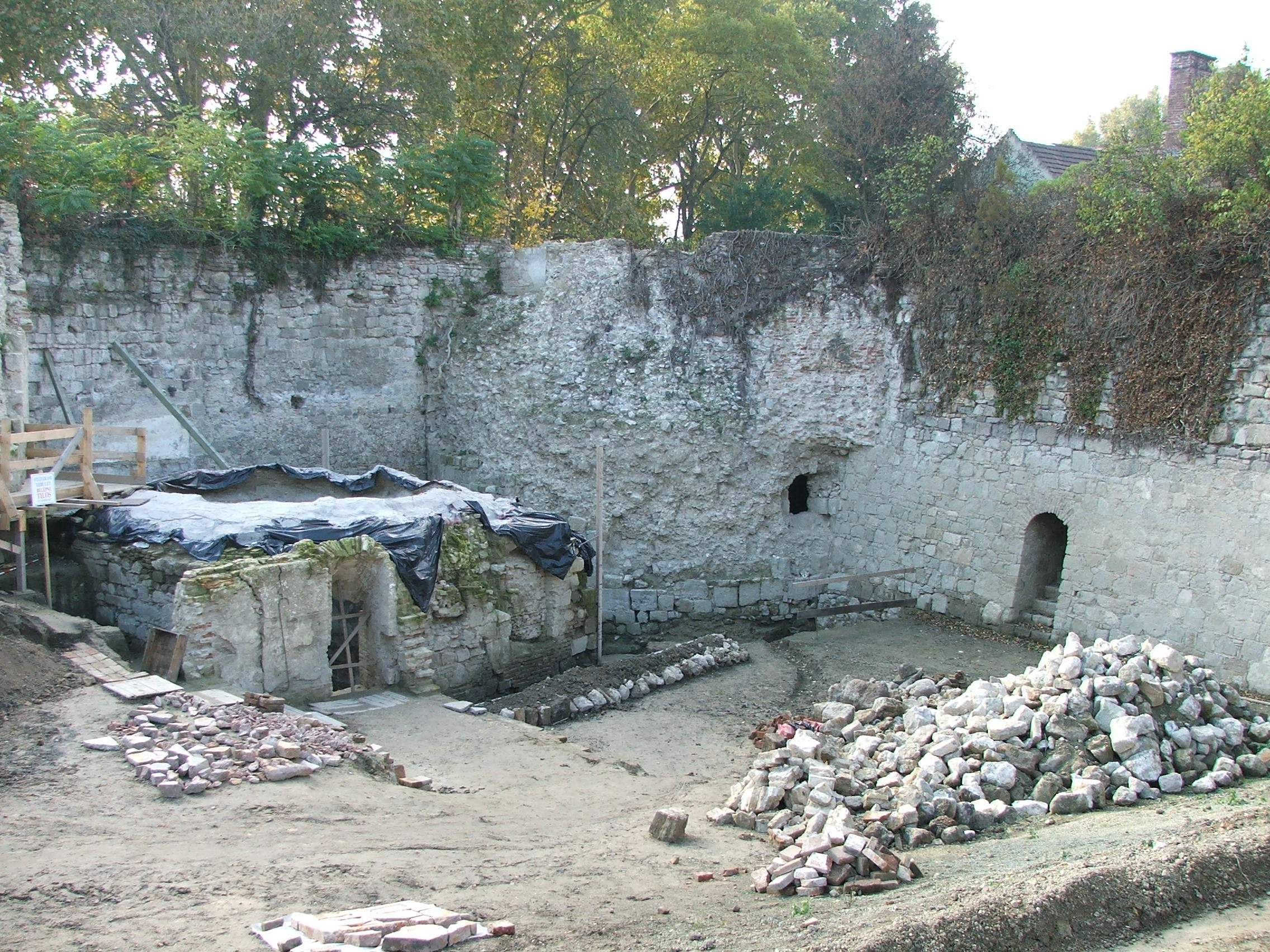 Hévízi bástya